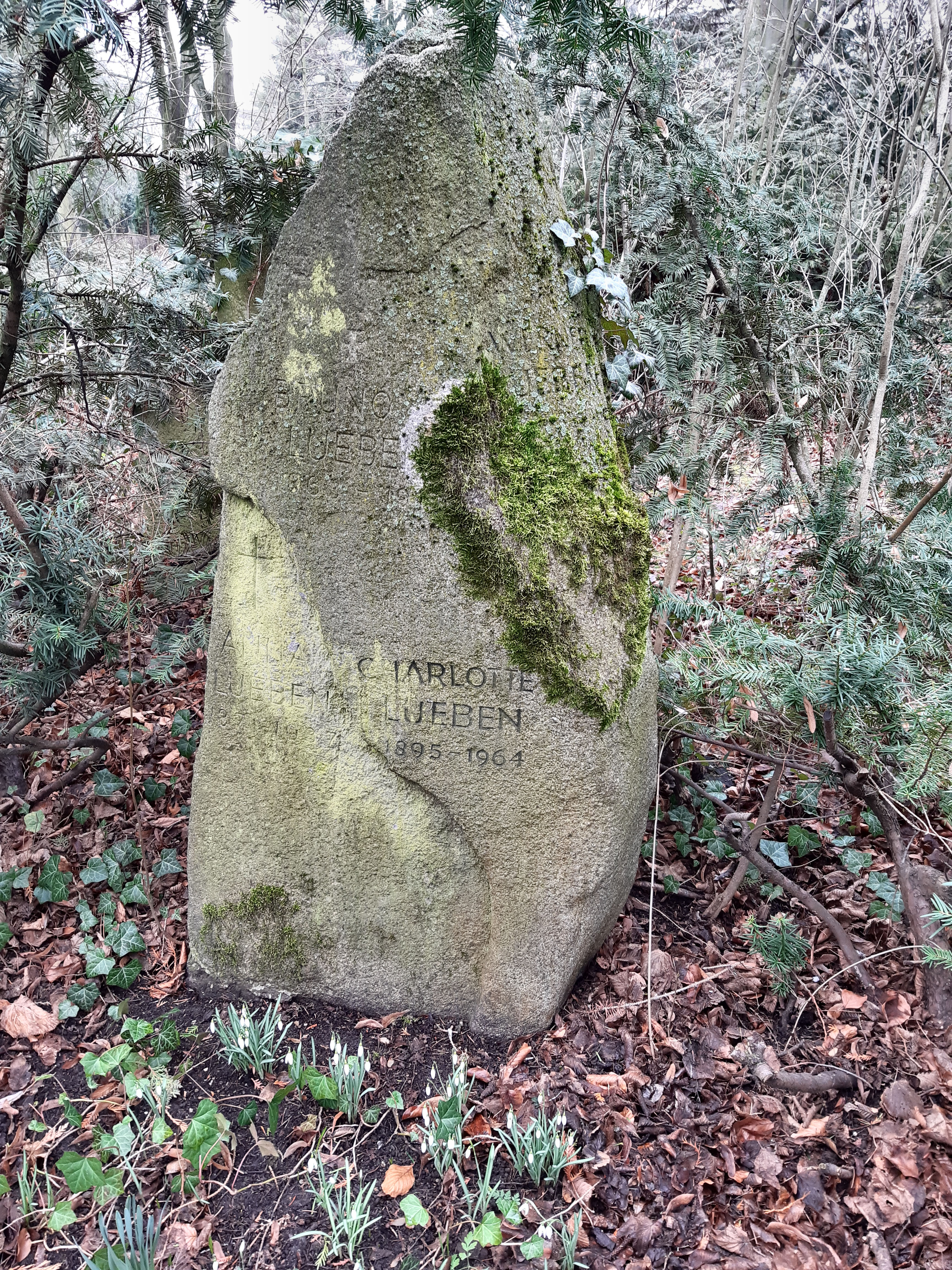 Familiengrab Lueben, mit der Grabstätte Werner Lueben, Südfriedhof, Halle (Saale)